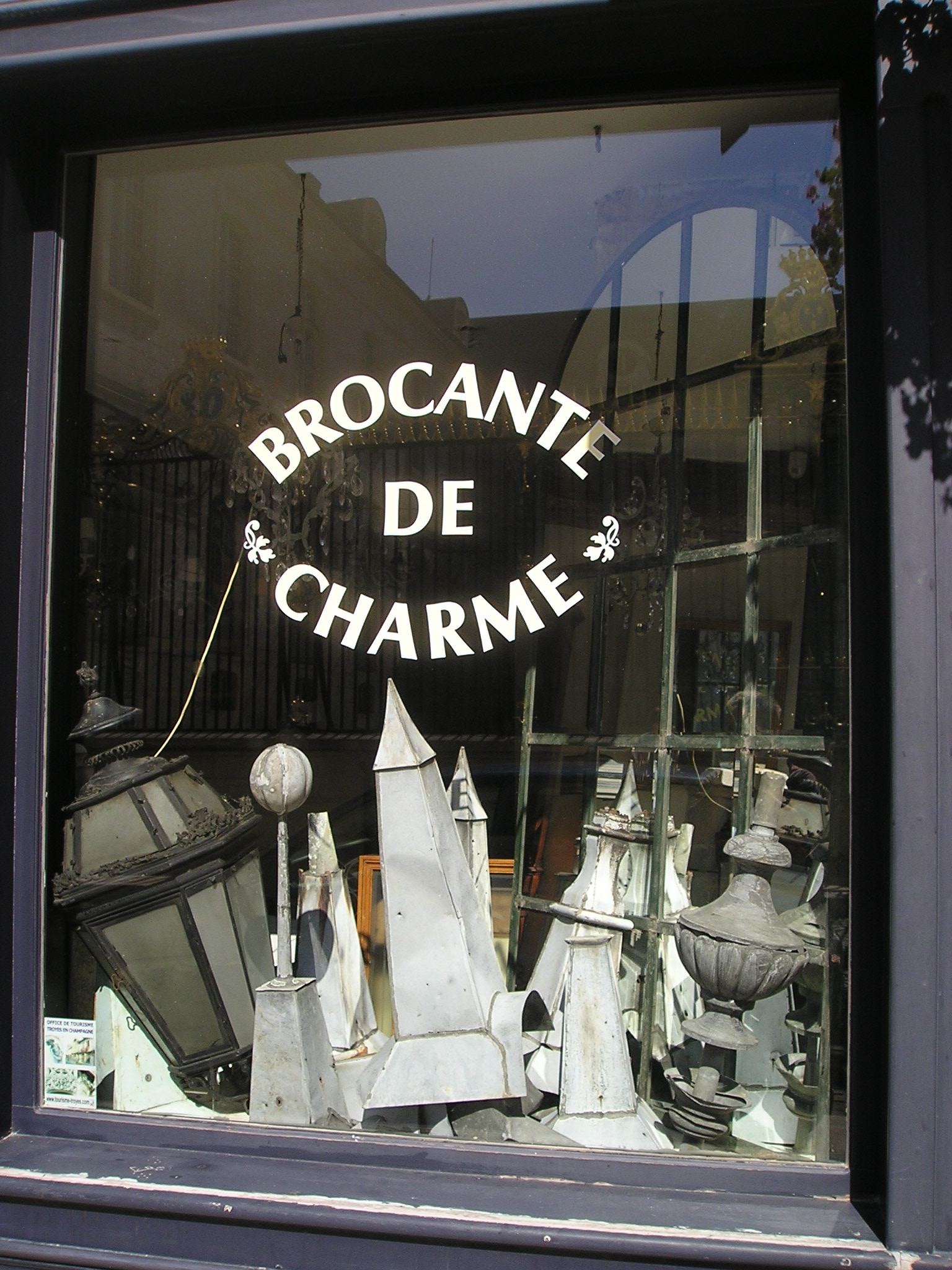 Brocante-Schaufenster in Troyes (Frankreich).jpg